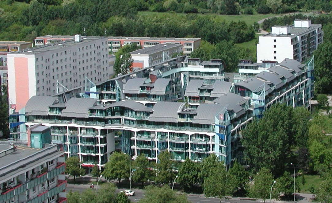 Das von Hinrich Baller projektierte Wohn- und Geschäftshaus Castello im Berliner Bezirk Lichtenberg